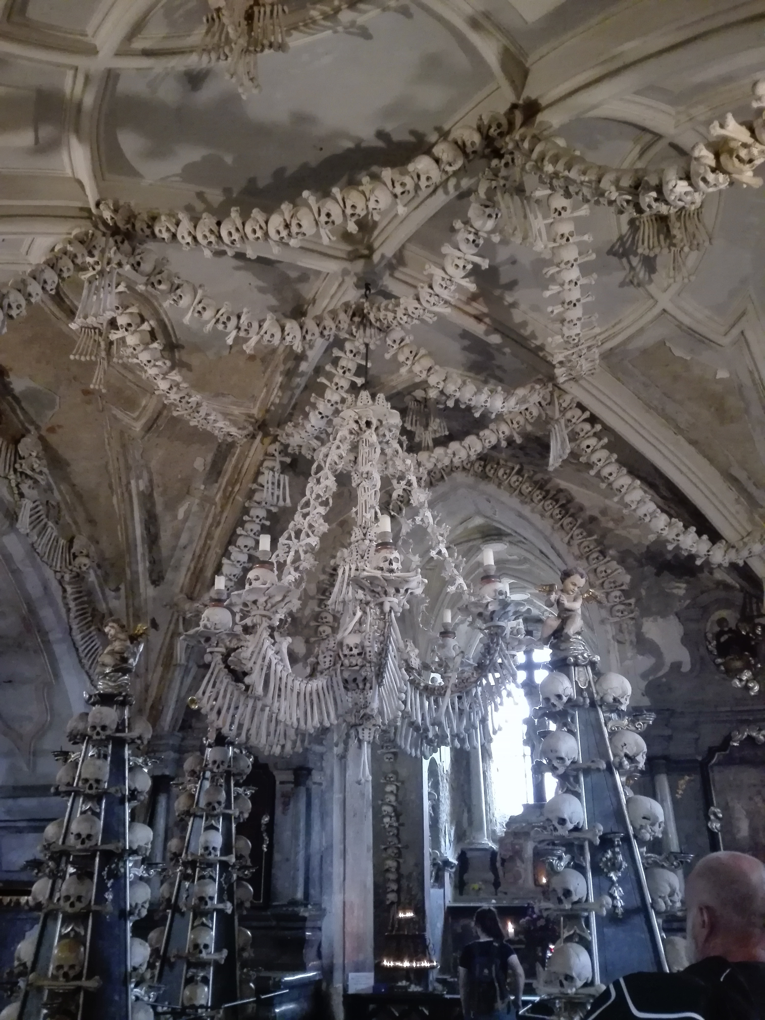 Interiér Kostnice